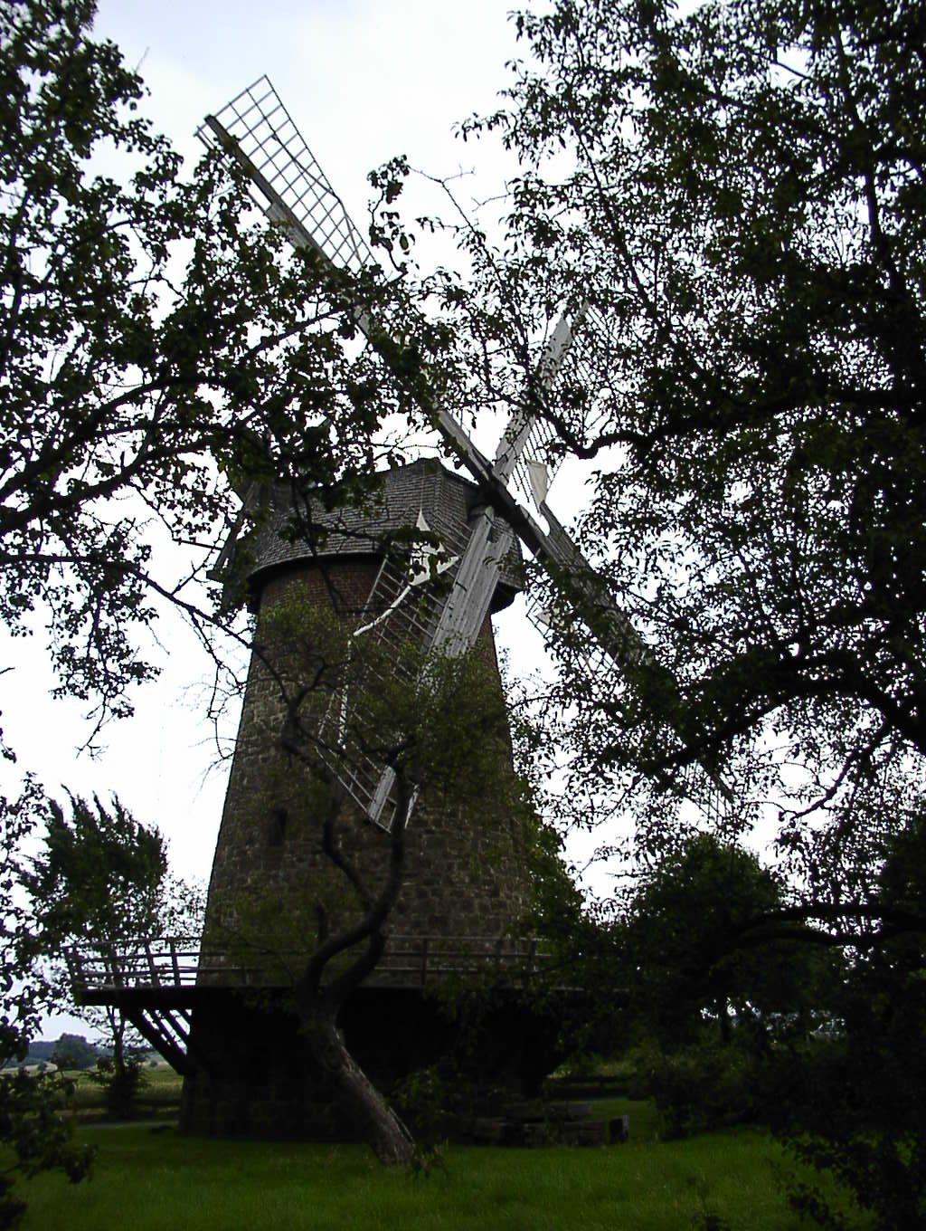 Windmühle Eilhausen Sonstiges: ...